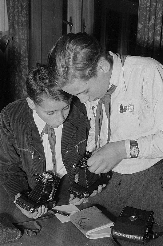 Original image description from the Deutsche FotothekZwei Pioniere mit Fotoapparaten